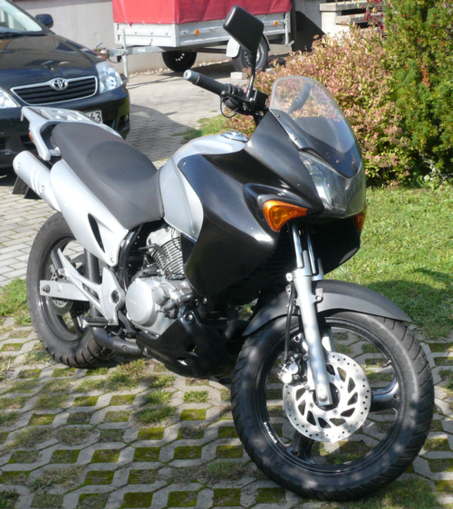 Honda Varadero XL 125 V (Baujahr 2001)